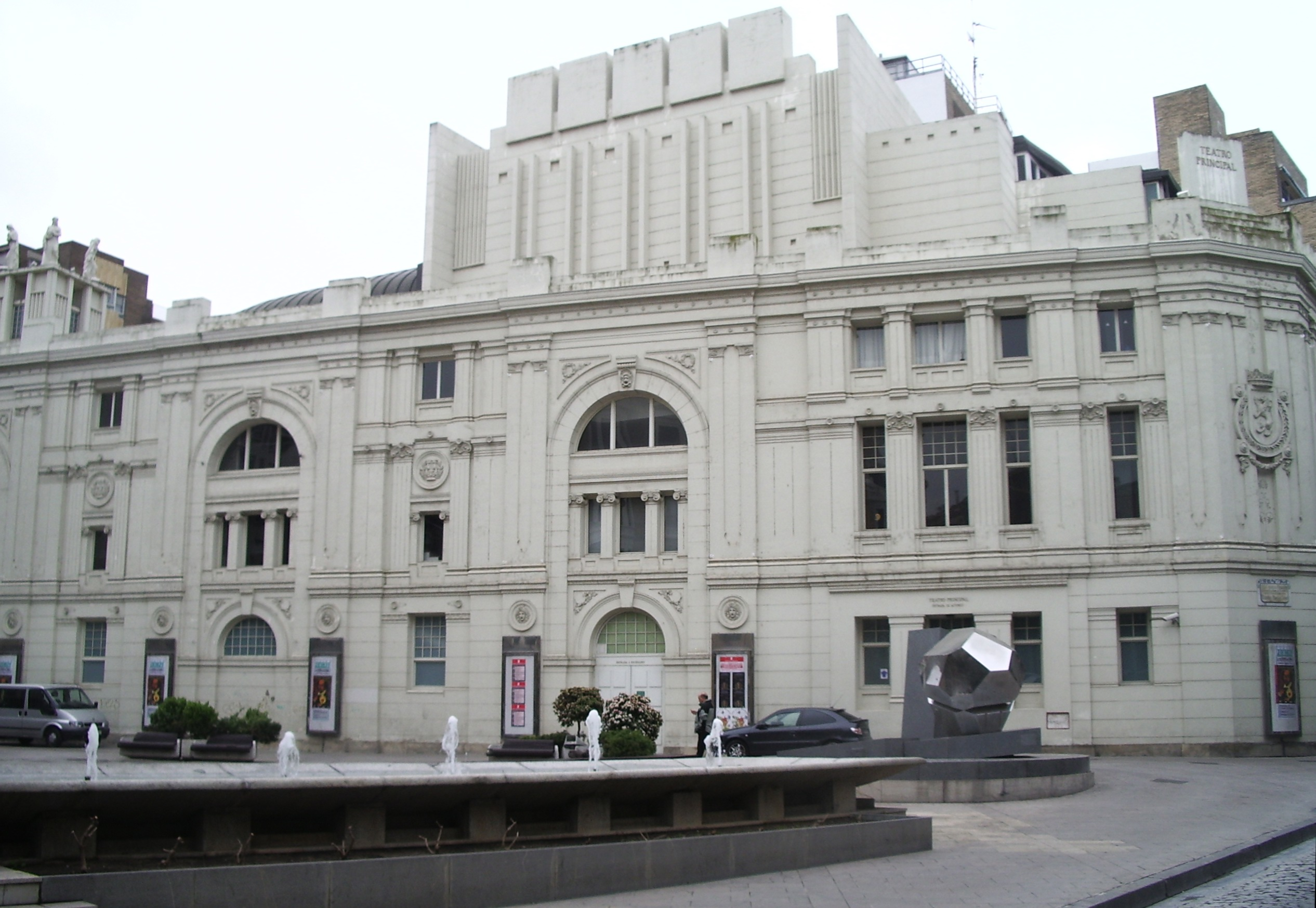 Teatro_Principal_(Zaragoza)